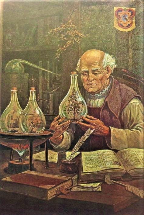 época de la química medicinal ,iatroquimista preparando sustancias curativas.